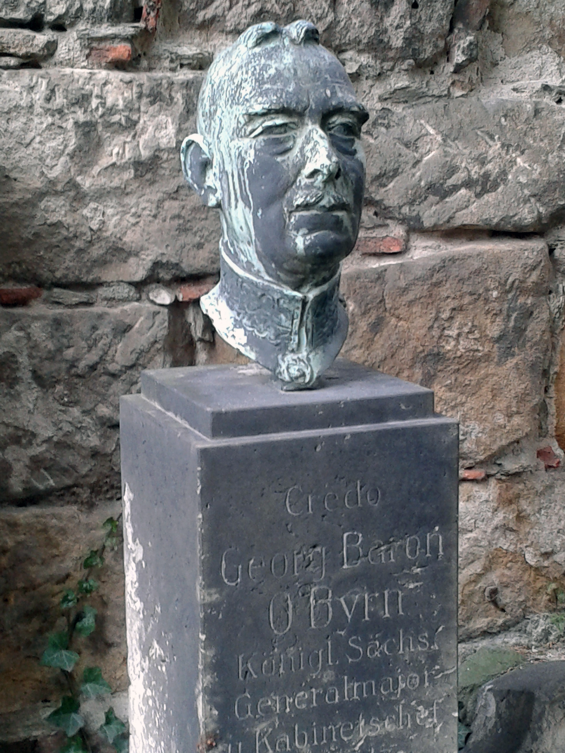 Portraitbüste von Georg Wrba auf dem Grabstein von Georg Baron O'Byrn. Die Grabstätte befindet sich auf dem Inneren (Alten) Katholischen Friedhof in Dresden (Friedrichstadt) in Feld B (dieses schließt sich nördlich an Feld A an und liegt links vom Hauptweg vor der Friedhofskapelle).